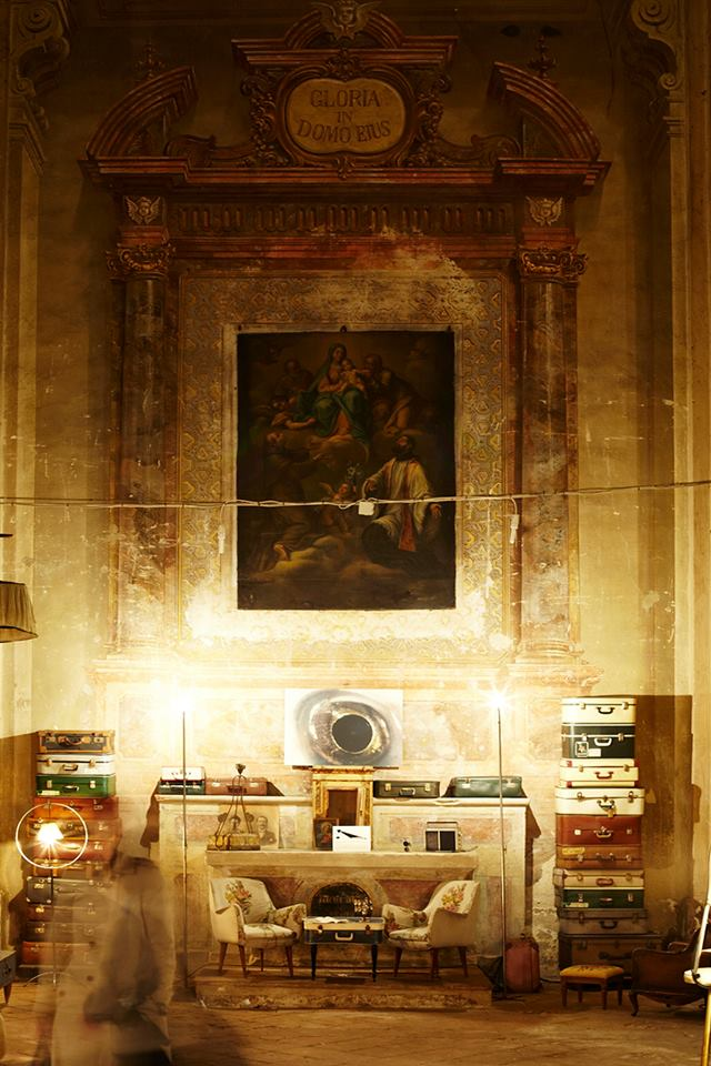 Primo altare a destra dall'ingresso con una delle cappelle laterali affrescate in stile barocco dal pittore piacentino Domenico Stroppa _ photo © Michele Costa